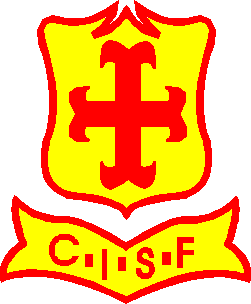 Primer escudo del Club Independiente Santa Fe